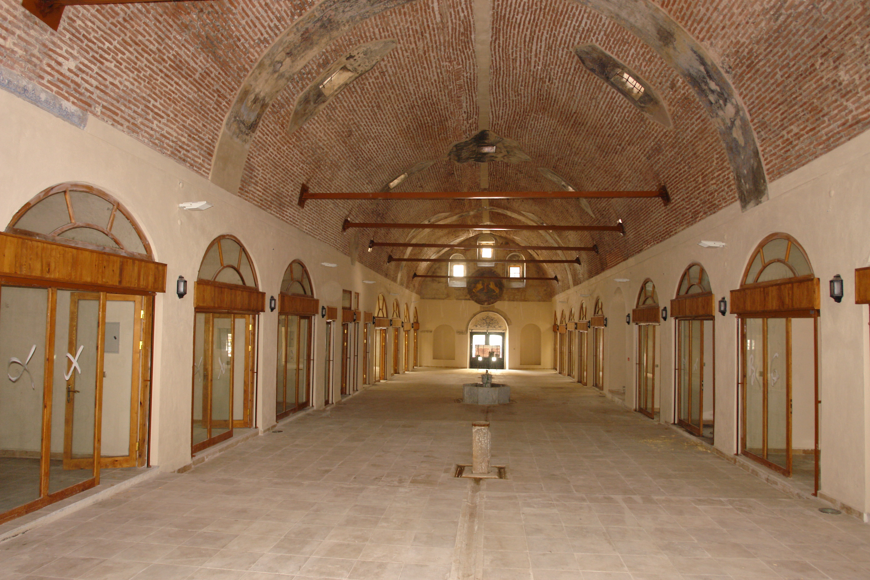 büyük bedesten kütahya